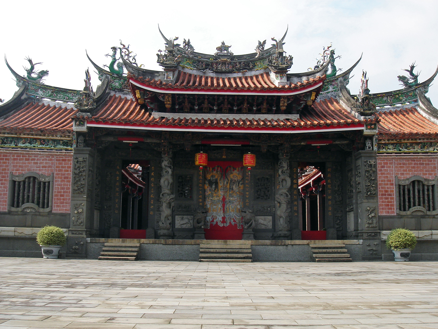 臺中林氏宗廟。